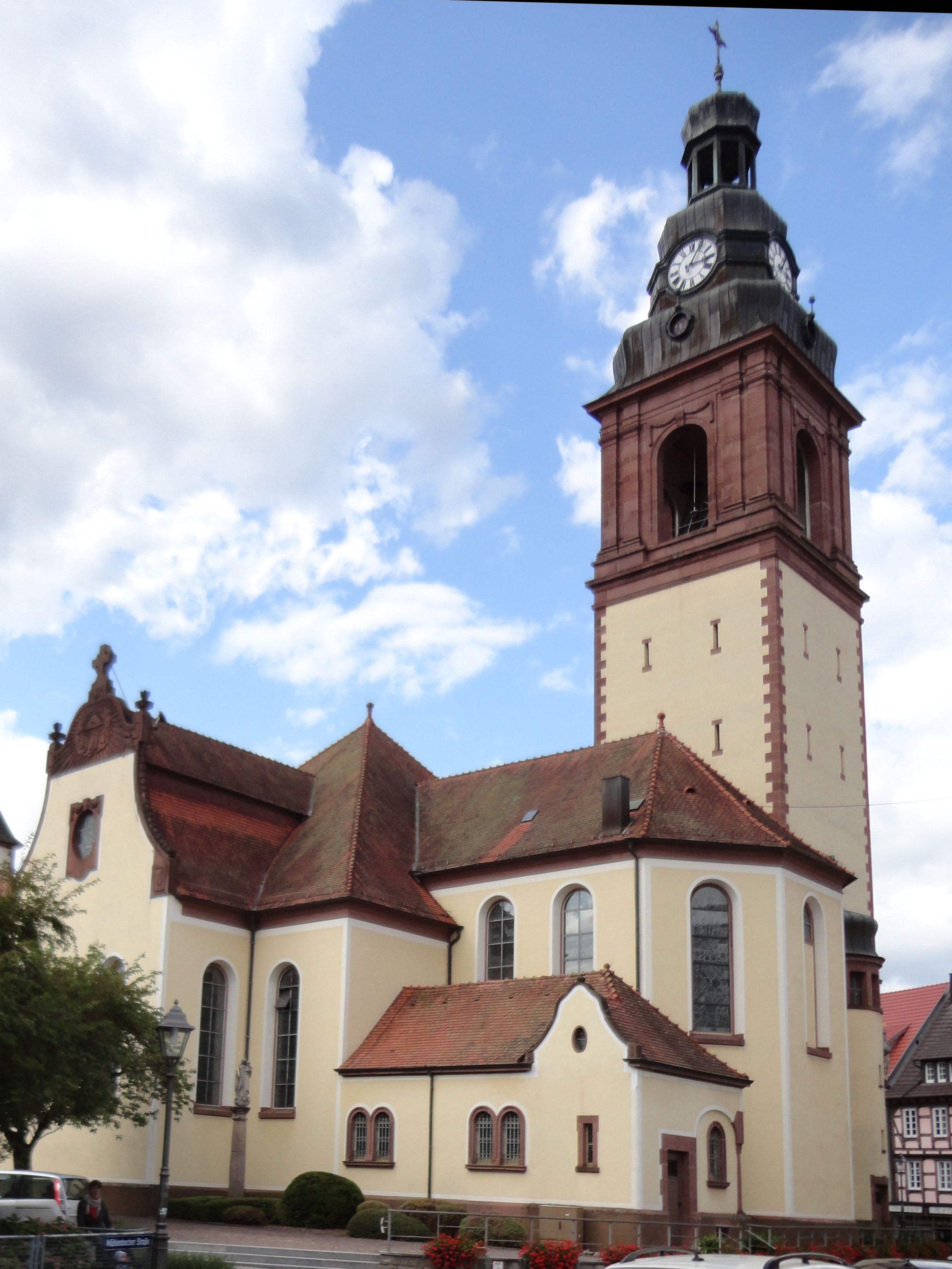 Pfarrkirche St. Arbogast in Haslach im Kinzigtal.